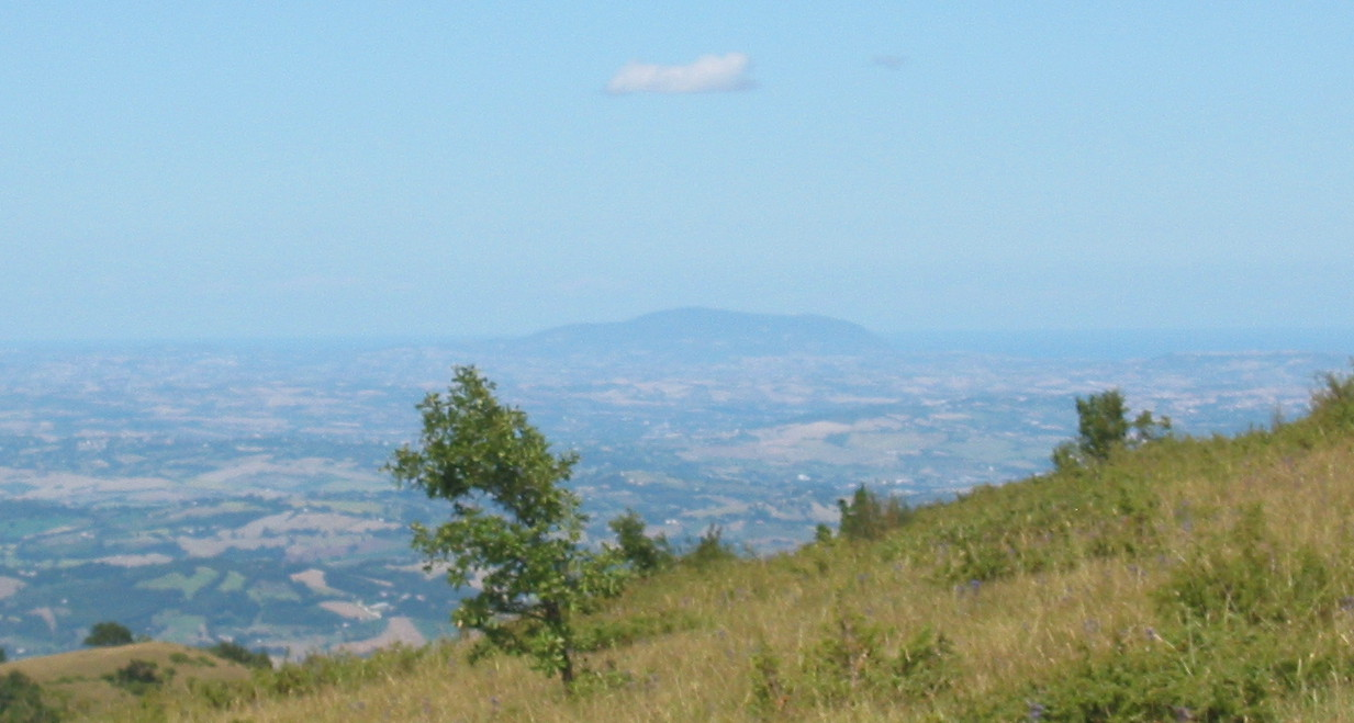 monte Conero visto dalle propaggini nord del Parco dei Sibillini